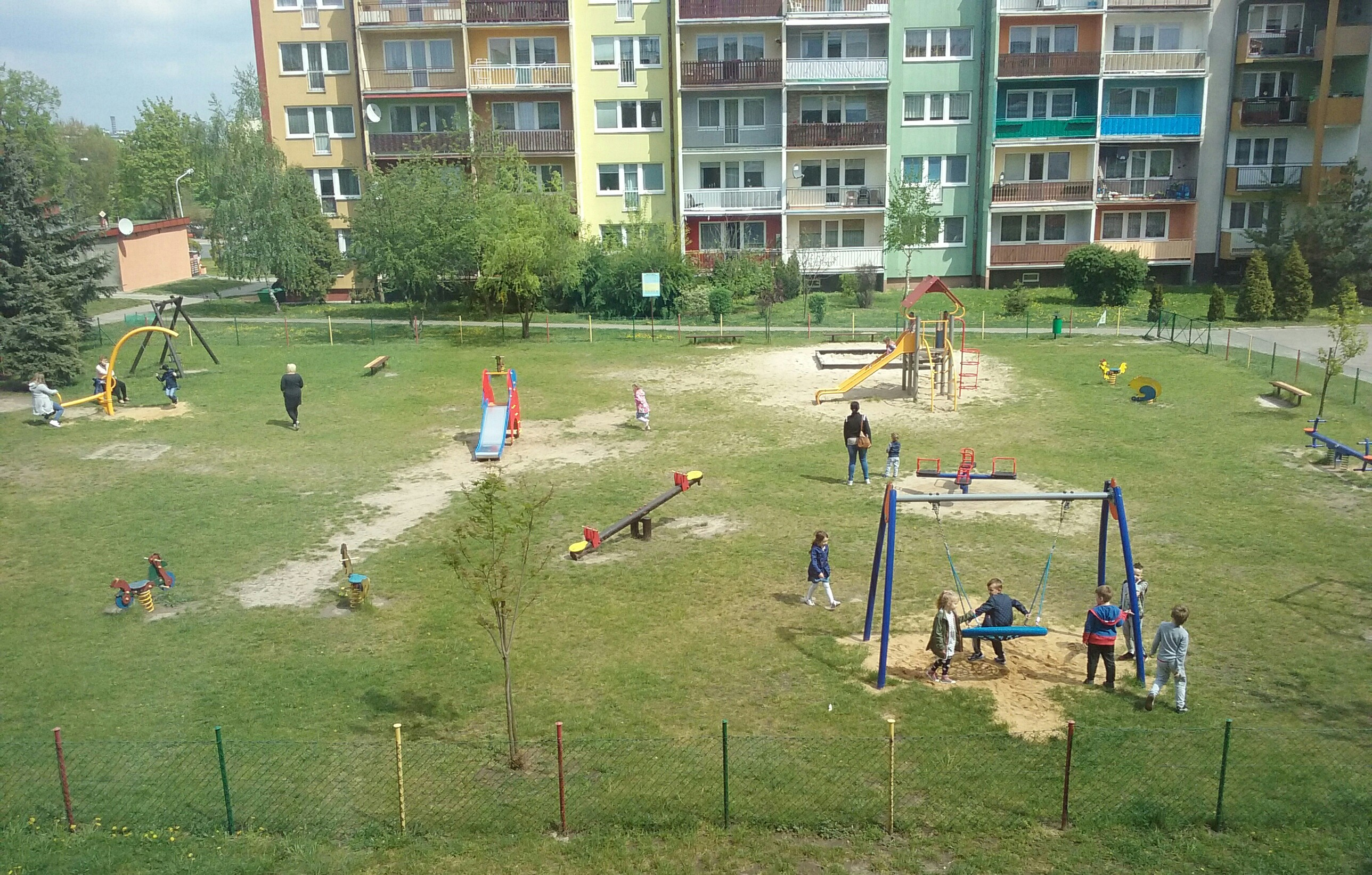 Tomaszów Mazowiecki w województwie łódzkim, PL, EU. Jedno z podwórek na osiedlu Hubala I w Tomaszowie, CC0